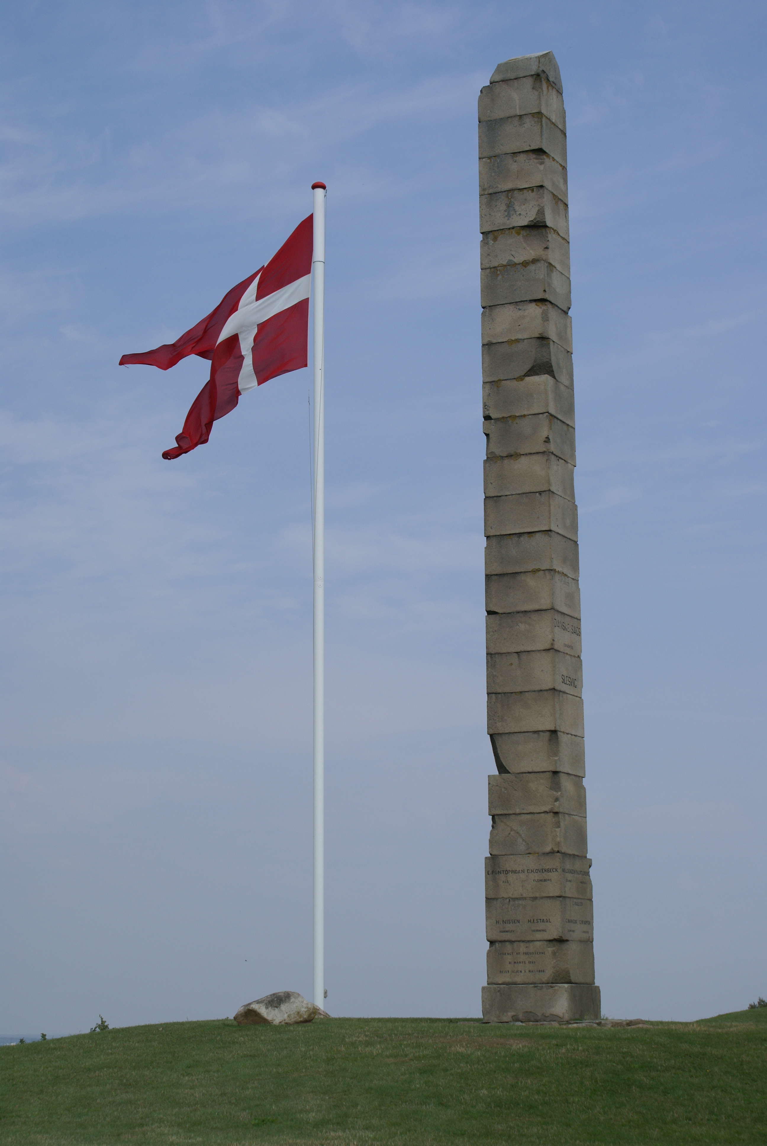 Skamlingsbanken